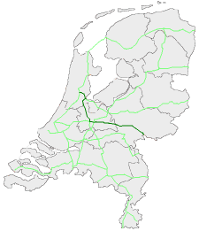 E35 in Nederland, zelf gemaakt